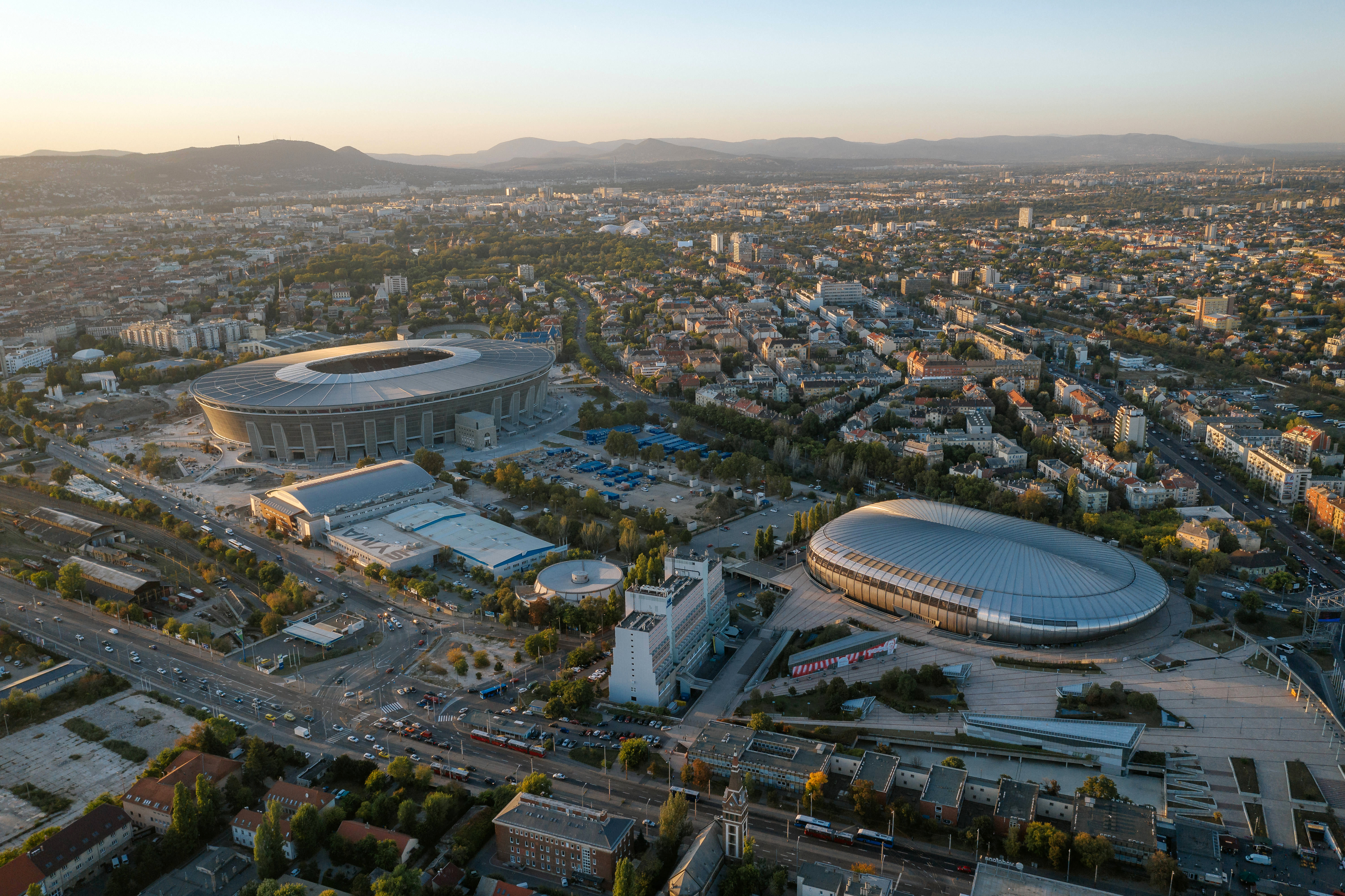 A Puskás Aréna légifelvételen.